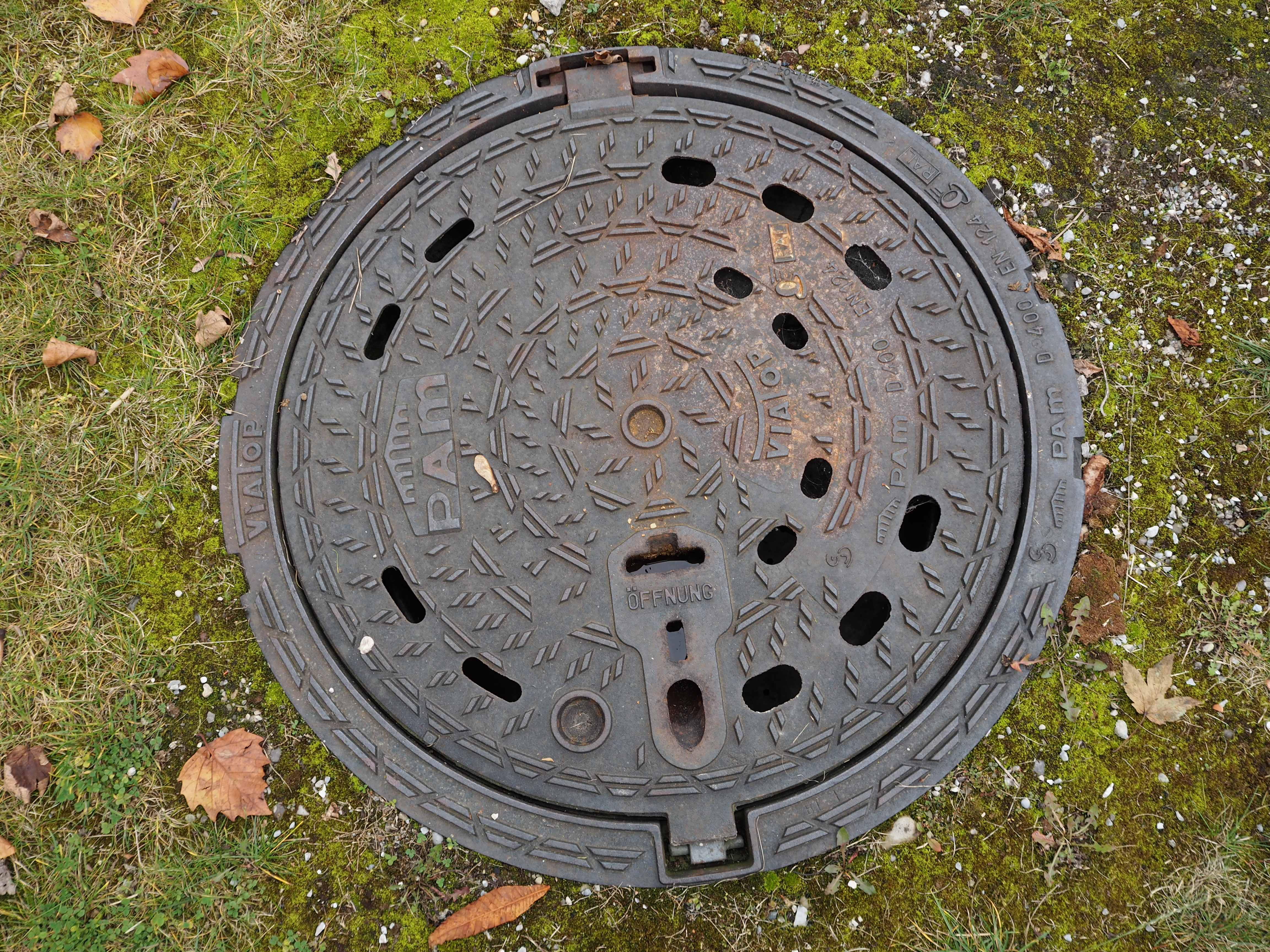 PAM Viatop Kanal-Schachtdeckel nach EN 124 in Ettringen (Wertach), Belastungsklasse D 400